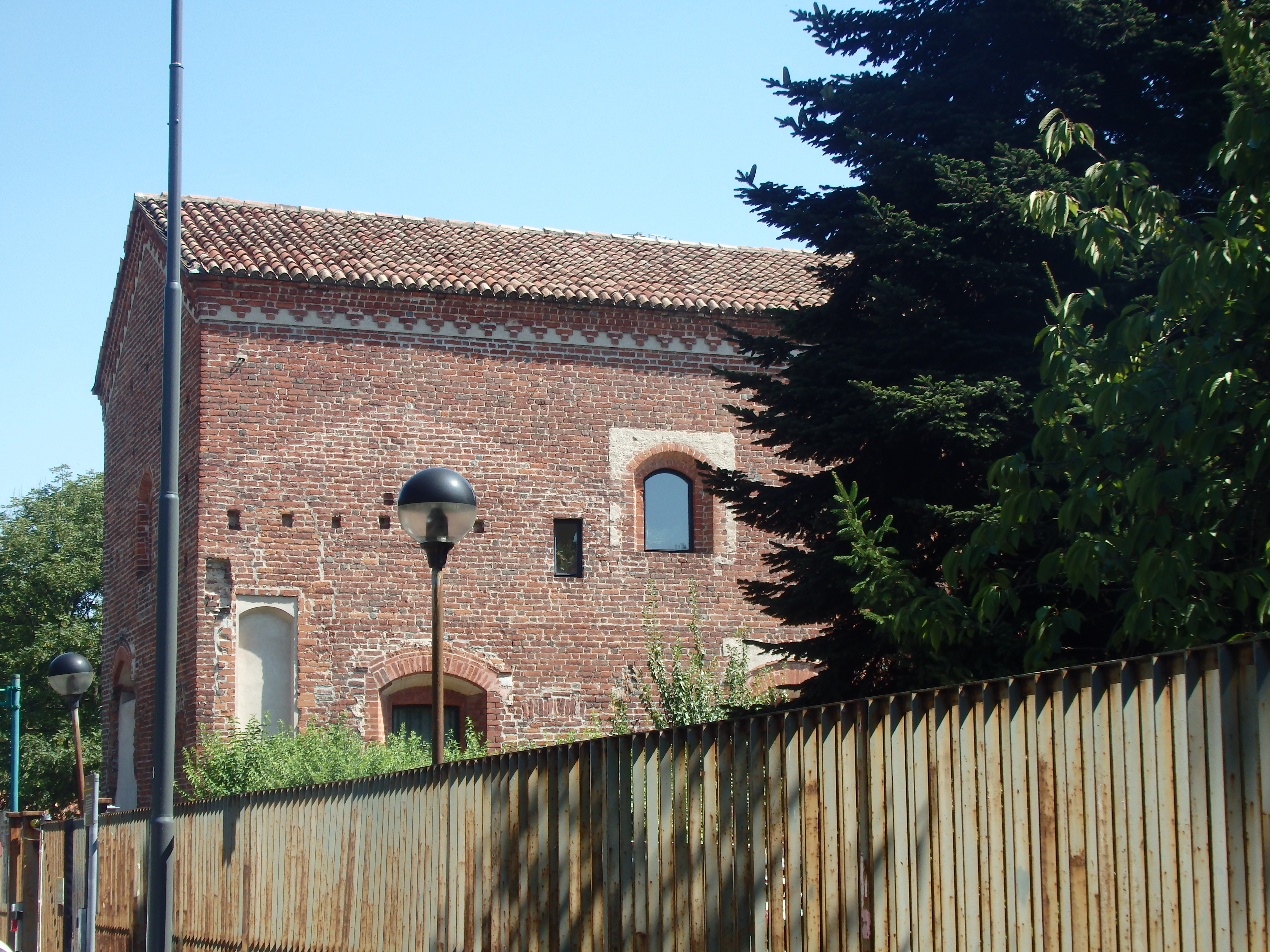 Cascina a Baggio